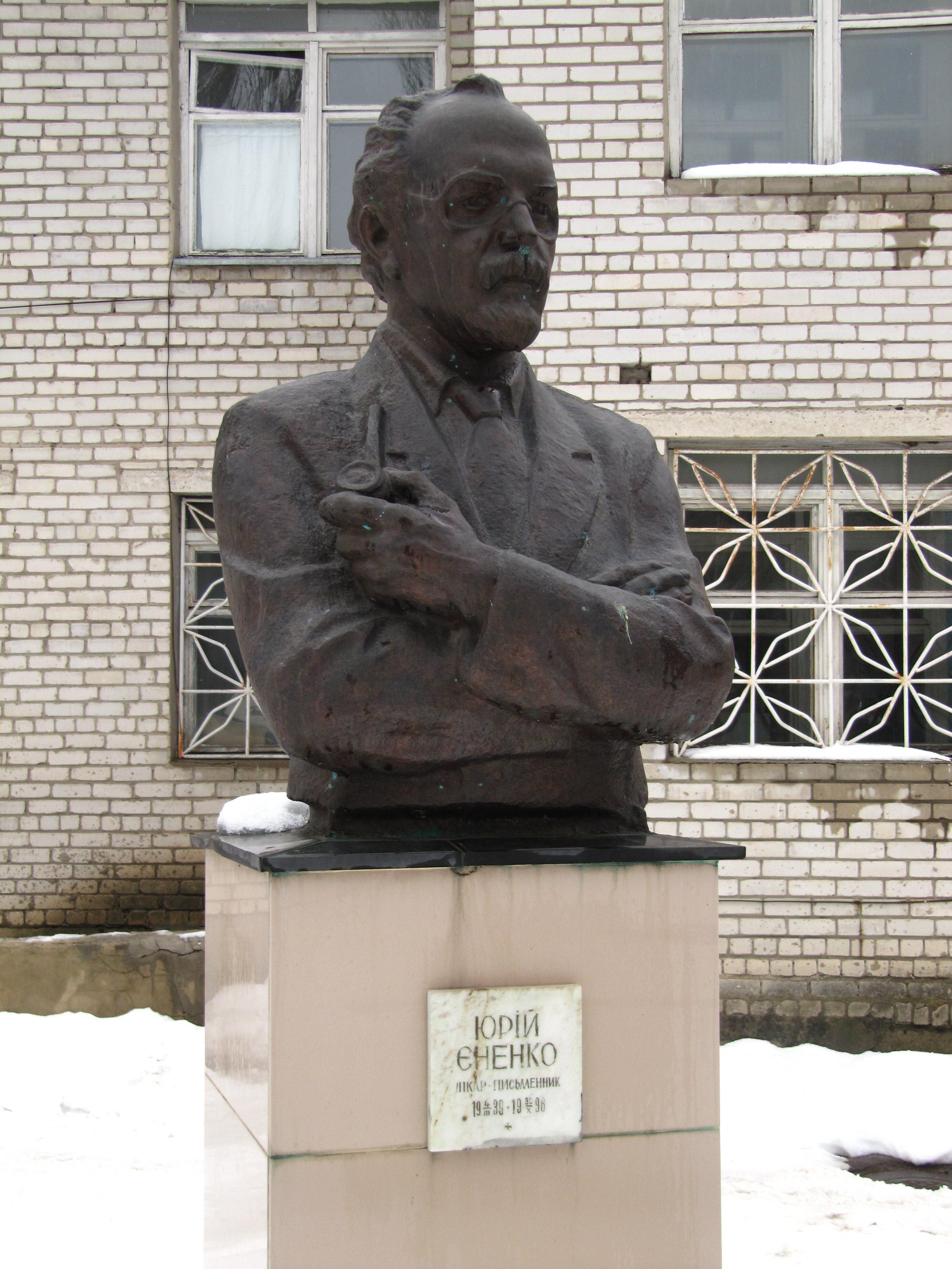 Бюст лікаря і громадського діяча Юрія Єненка на території Луганського онкодиспансера.